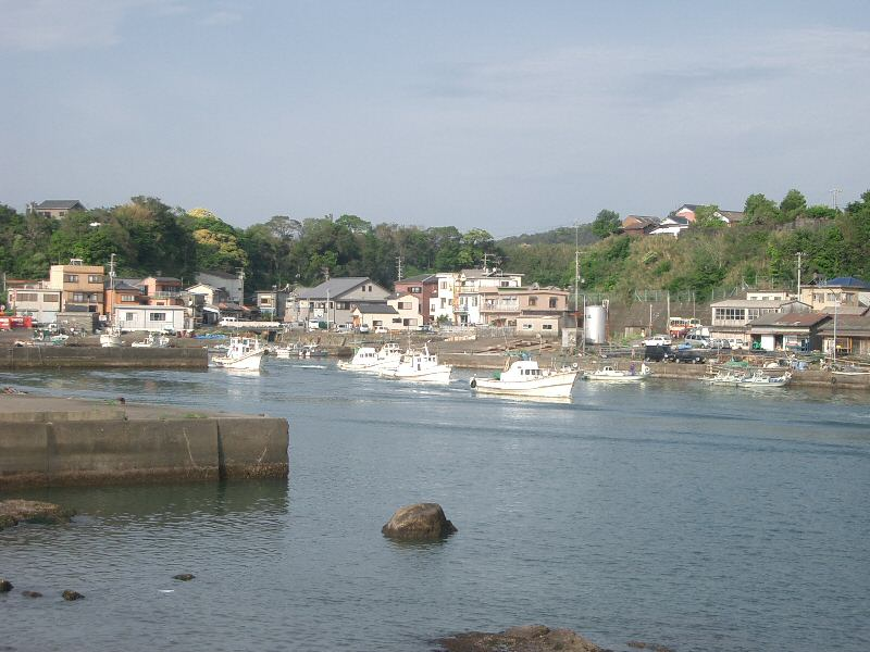 シラス漁船の出漁 2005年5月高知県にて投稿者自身の撮影